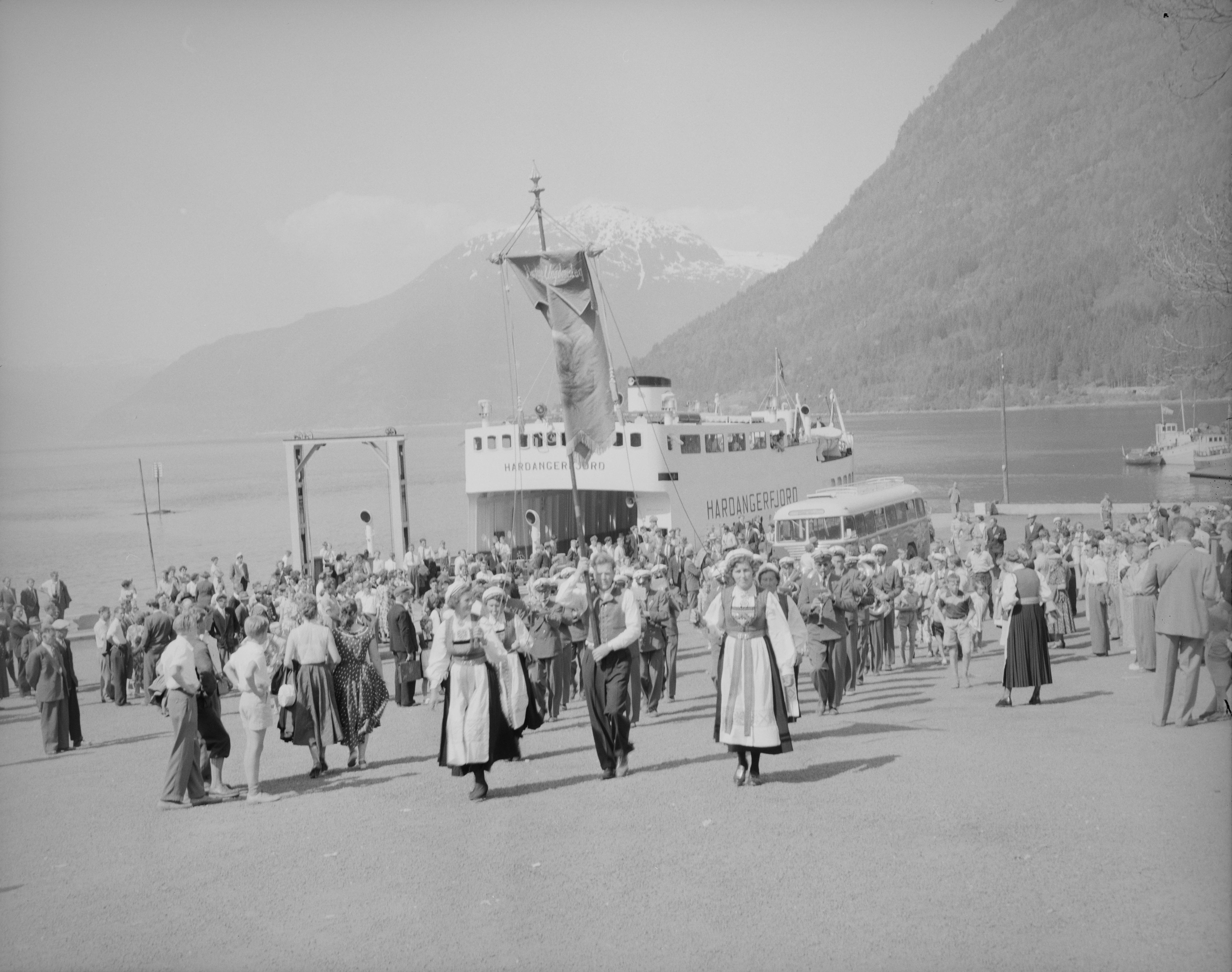 Bildet er hentet fra Nasjonalbibliotekets bildesamling Kinsarvik, Ullensvang, Hordaland